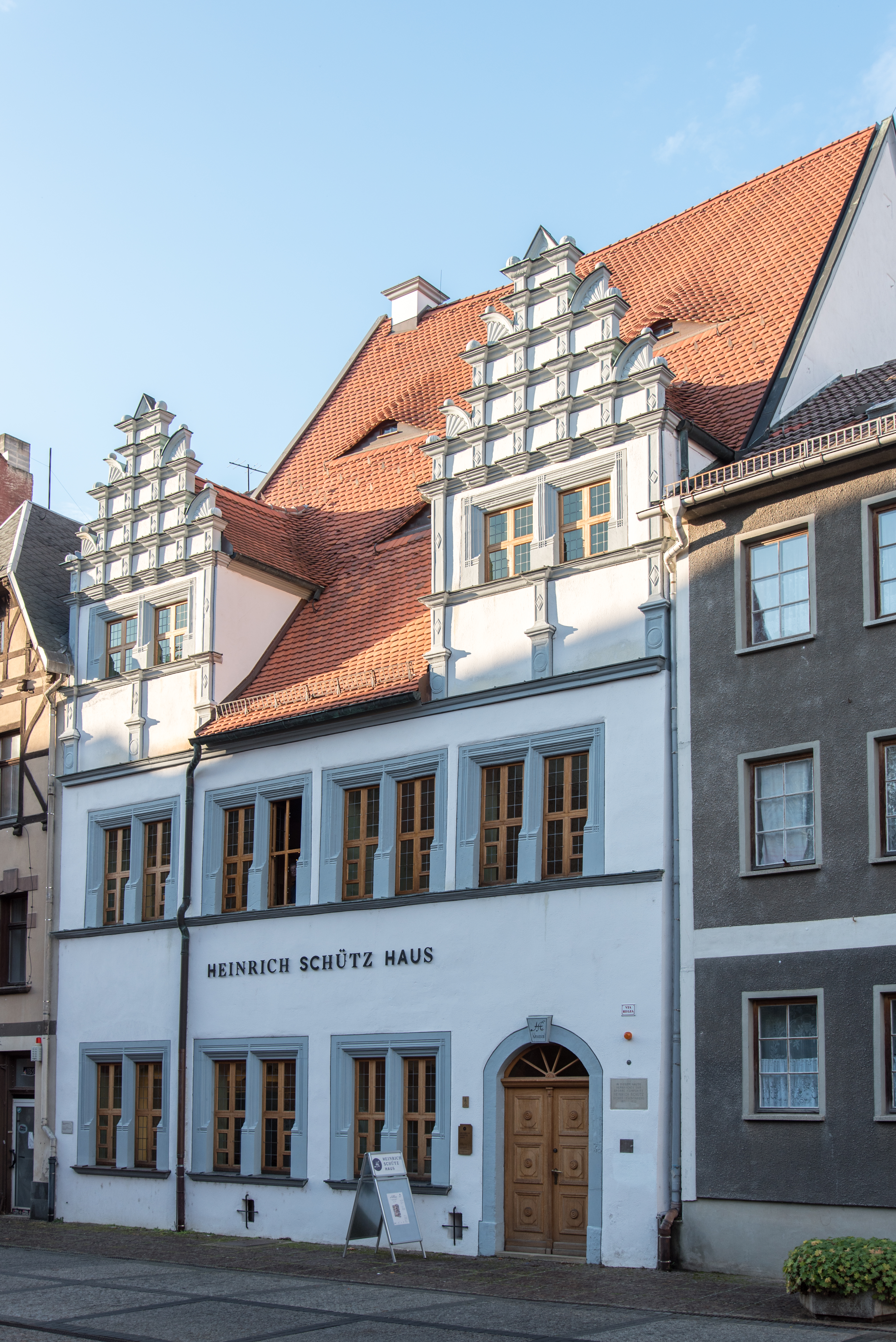 Weißenfels, Nikolaistraße 13